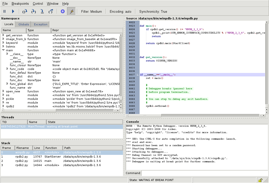 Winpdb (v1.3.6) debugging itself (Winpdb is a Python debugger). Screenshot taken in openSUSE 10.3.